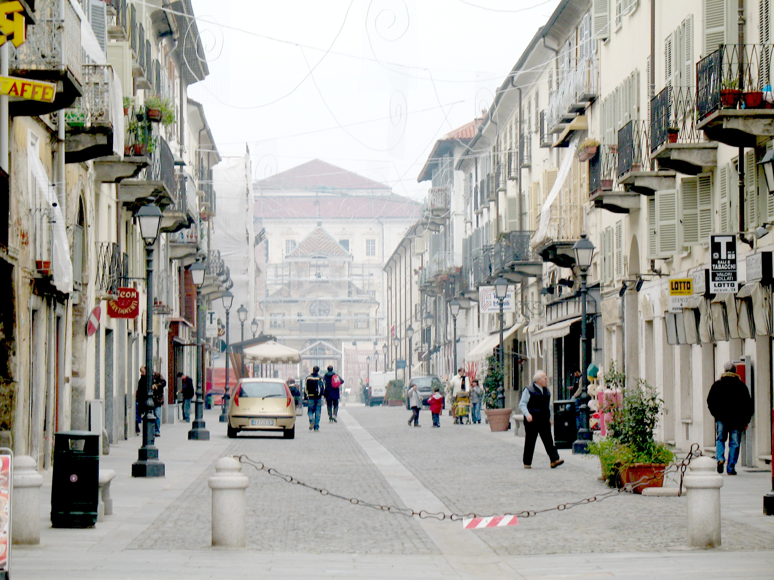 Venaria Reale, Torino. Centro storico.